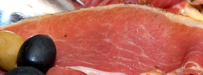 Pršut s maslinama